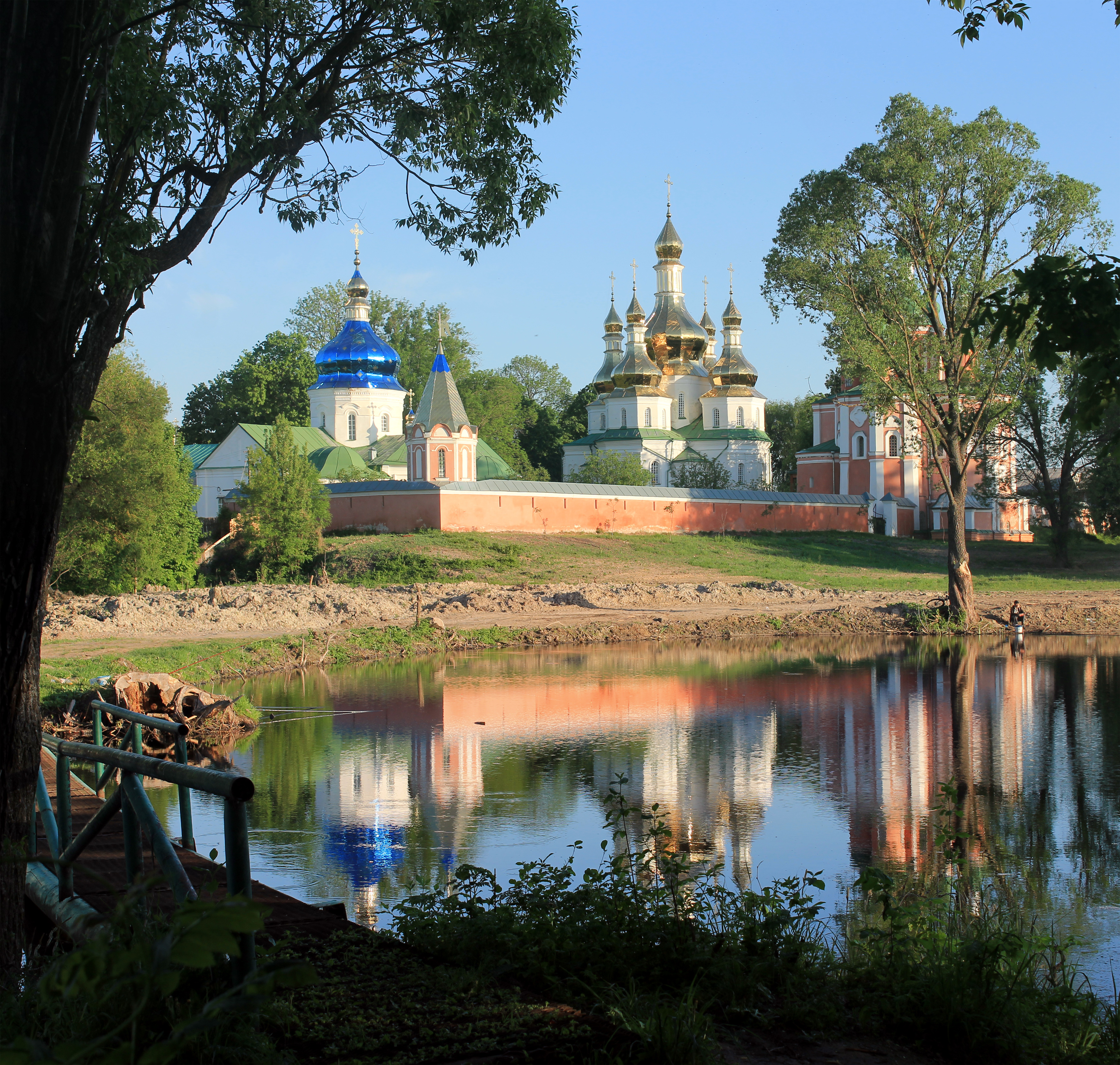 Густинський монастир 17-19ст., с.Густиня, Прилуцький р-н., Чернігівська обл.